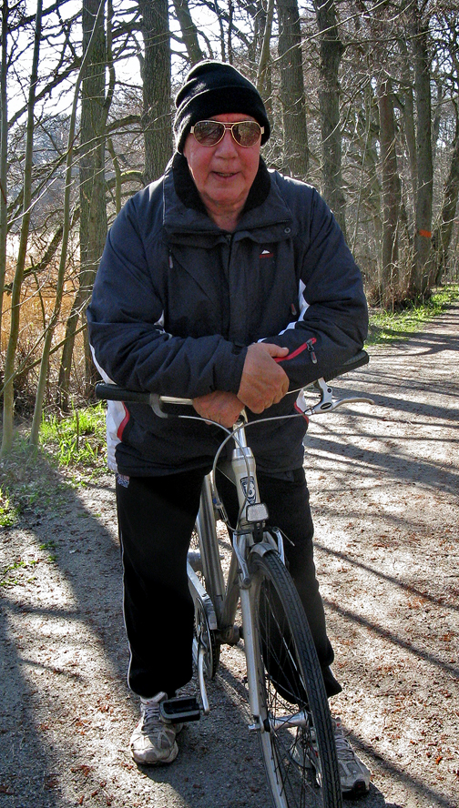 Ehrling Wahlgren Ystad 2011.